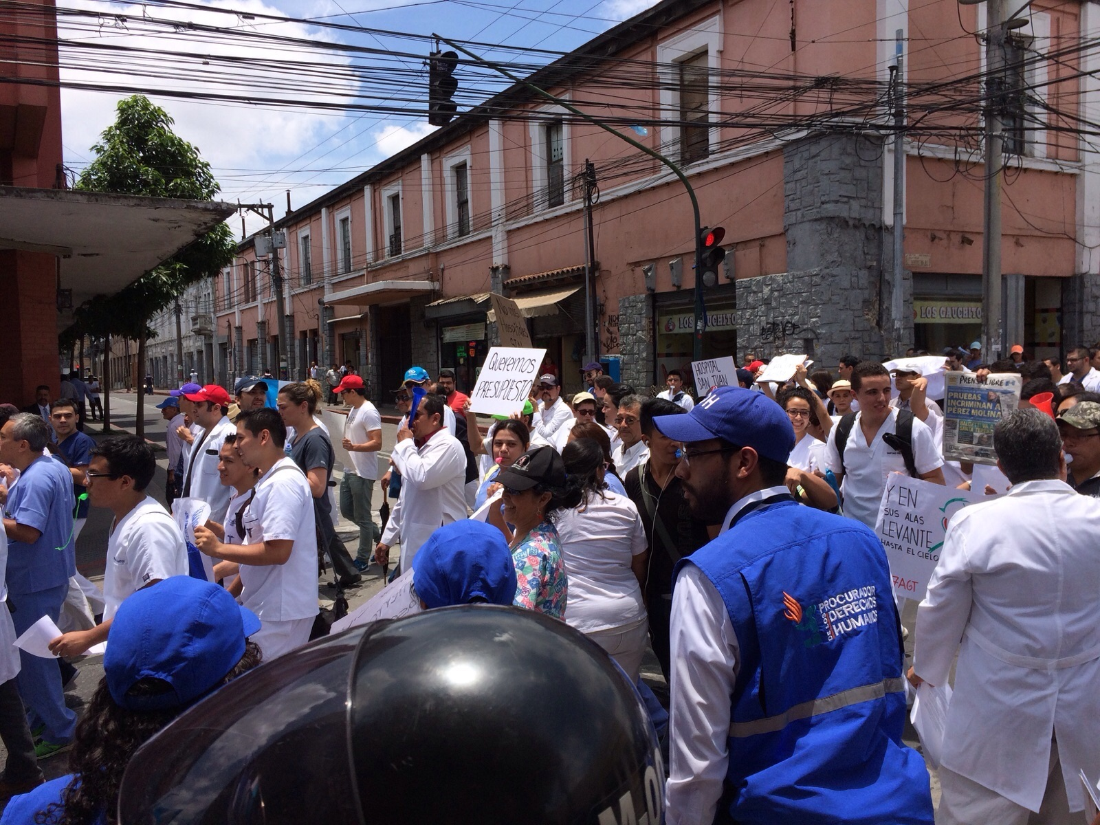 Paro Nacional en Guatemala, 27 de agosto de 2015z